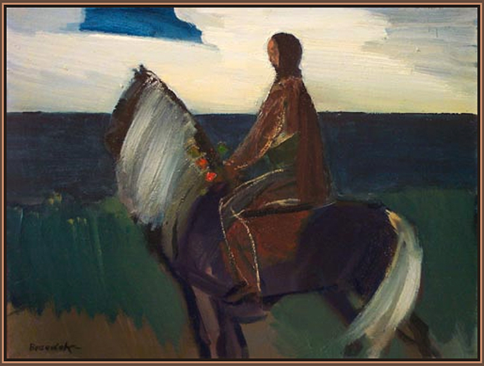 Idősebb Benedek Jenő (Kecskemét, 1906. január 16. – Budapest, 1987. július 19.) magyar festő A lovas című olajfestménye, 1968 - 60x80 cm